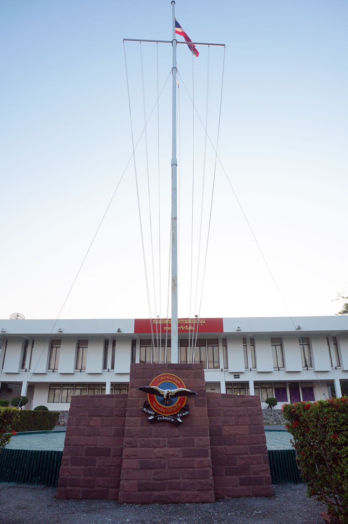 กองร้อยกองบังคับการ กรมสนับสนุน กองพลนาวิกโยธิน